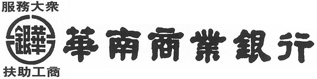 華南商業銀行1982年版中文標準字（已停用）